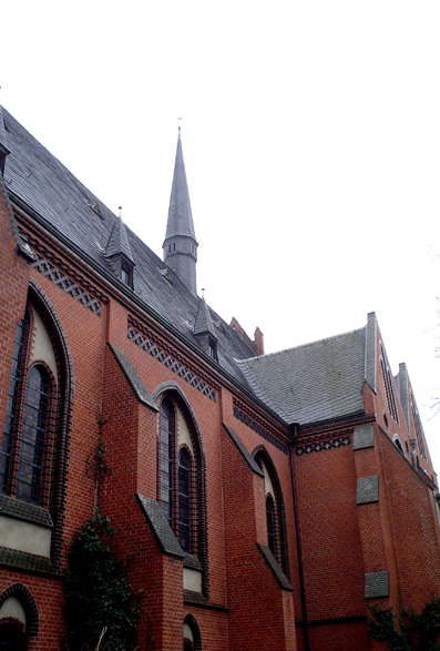 Seititenschiff, Querhaus und Dachreiter der neugotischen Auenkirche in Berlin-Wilmersdorf